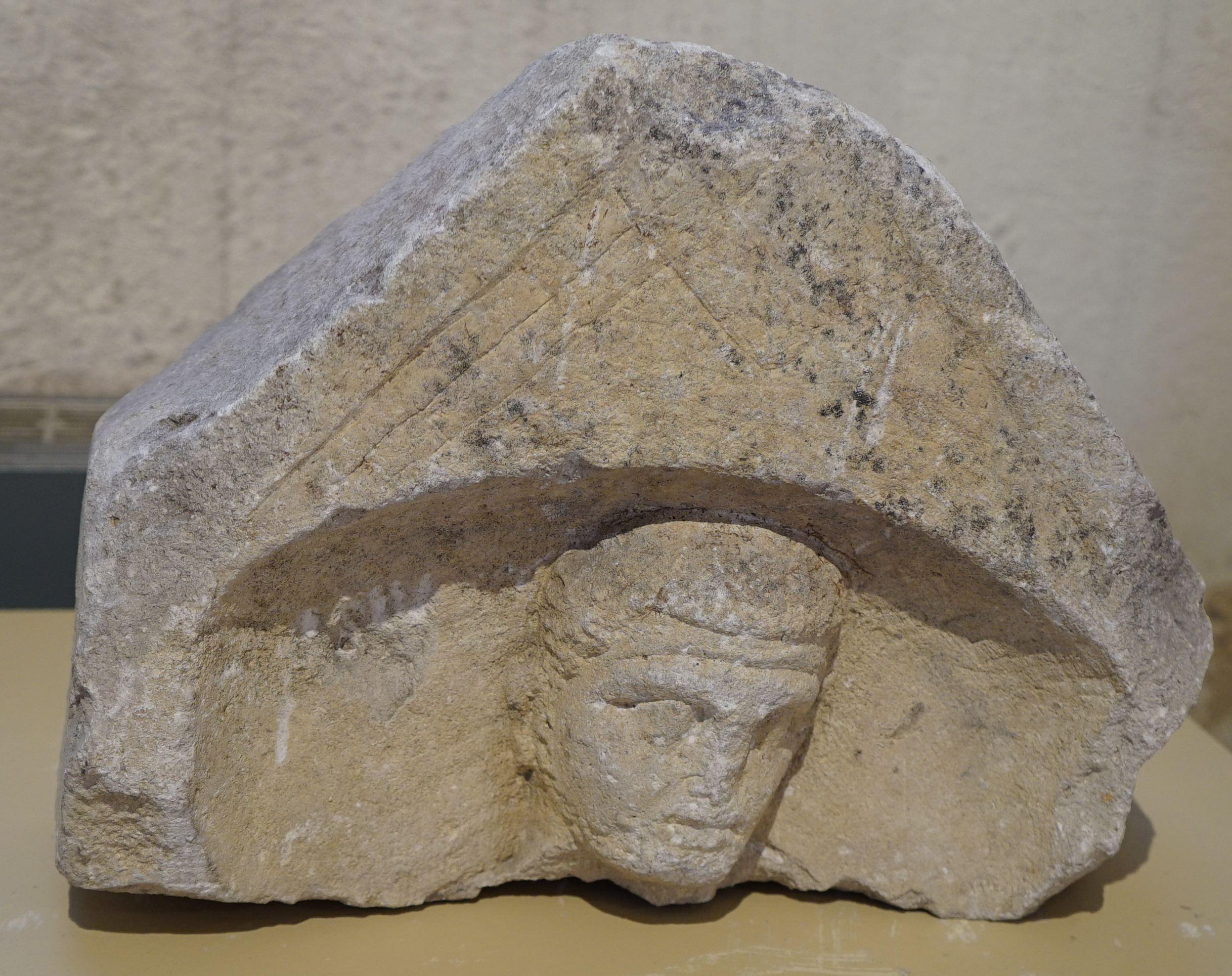 présenté au musée de Toul, N° d'inventaire 990 55.